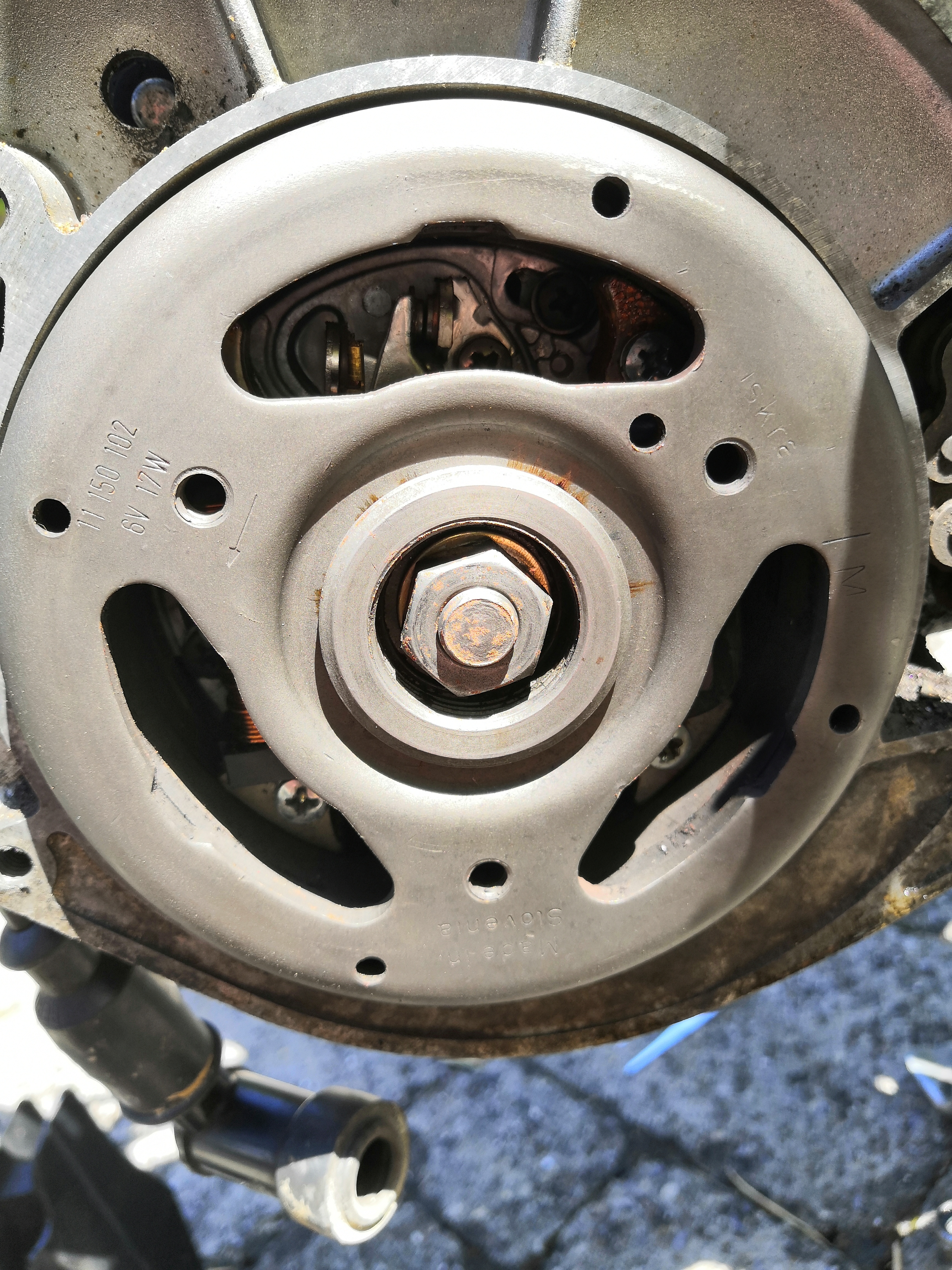 Dies ist eine Zündung eines Sachs 503 ADV CH (Hinter dem Schwungrad)